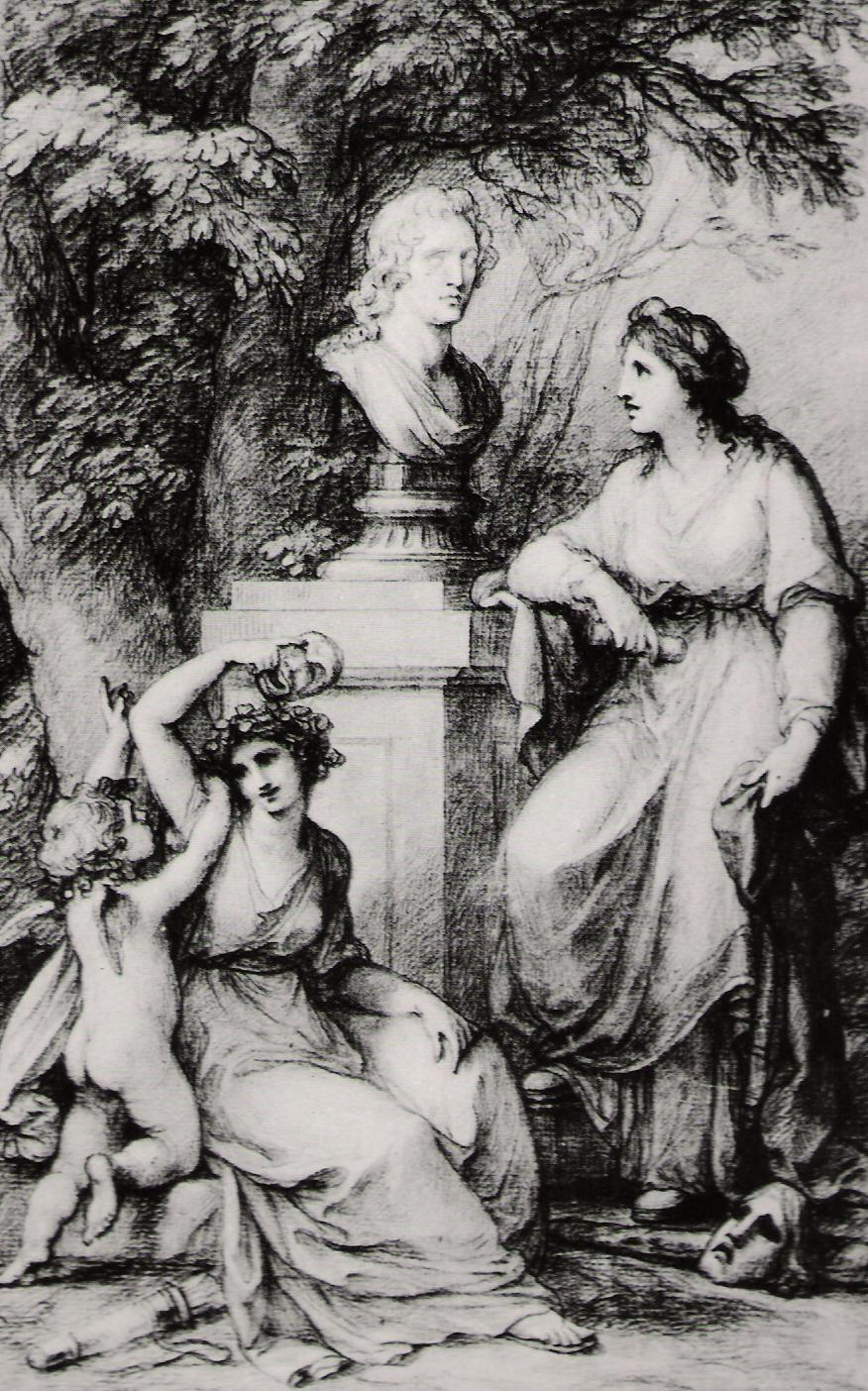 Huldigung für Goethe. Huldigung der Muse vor Goethes Büste. Zeichnung von Angelika Kauffmann